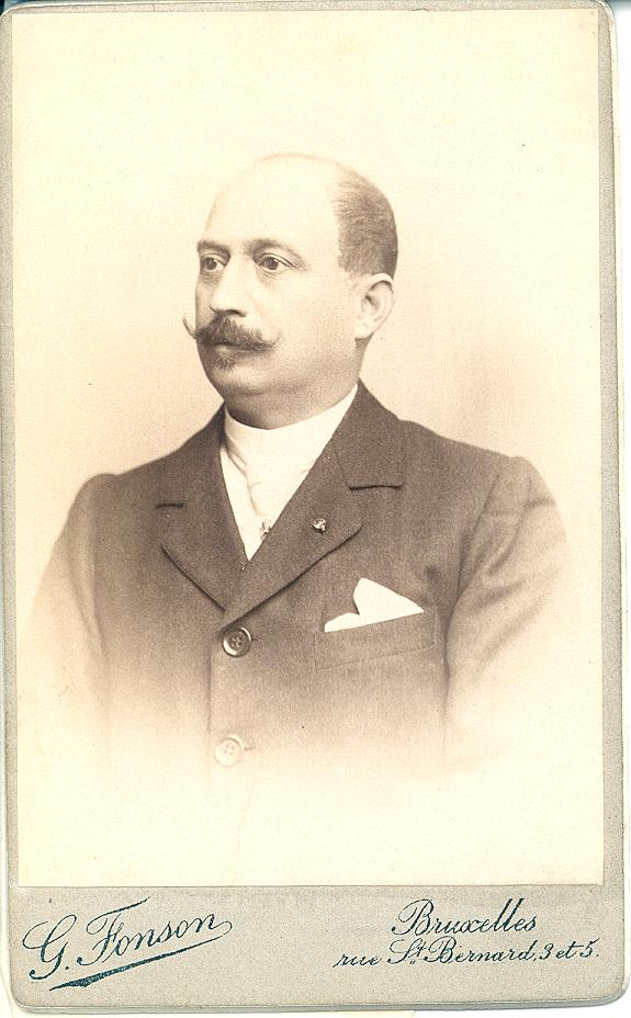 Charles MICHEL, sinologue belge, époux de Isabelle STRAATMAN. Marie Octavie Pétronille Camille Hermance Françoise Joséphine Henriette Charlotte dite Isabelle STRAATMAN à Saint-Josse ten Noode le 30 octobre 1865, qui épousa le sinologue et diplomate Charles Pierre MICHEL , fils de Pierre et de Jeanne Jacqueline Adriaenssens, né à Flessingue (Hollande) le 9 janvier 1853 décédé en sa demeure Grand-Place à Bourgeois (Rixensart), le 26 juillet 1920. Isabelle STRAATMAN est la fille de Arnould Nicolas STRAATMAN, né le 15 juin 1835, décédé le 10 mars 1877, épousa à Laeken Marie Joséphine BRIDOUX, née à Bouillon le août 1842, fille de Jean-Baptiste et de Alexis Durmoir. Elle est la petite fille de l'armateur Lambert Straatman.